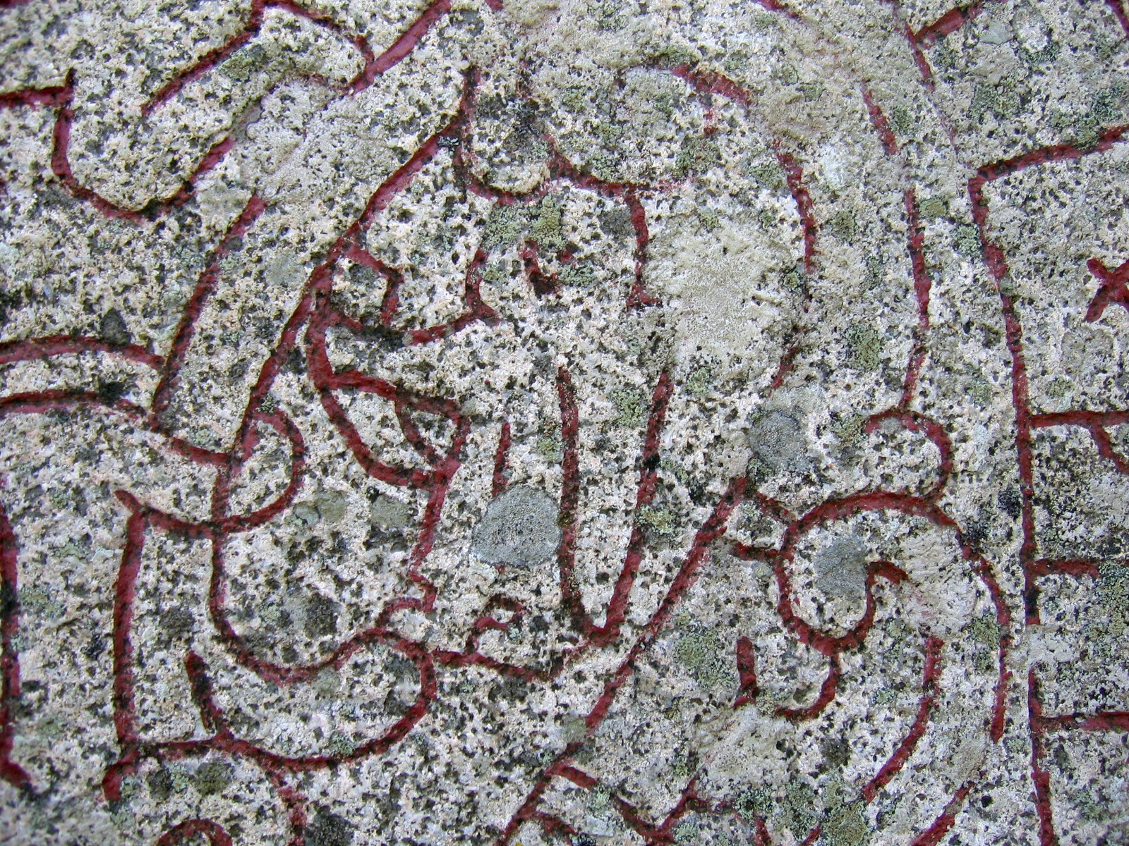 Runestone